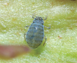 검은배네줄면충 - 벌레혹 속의 산성형 성충